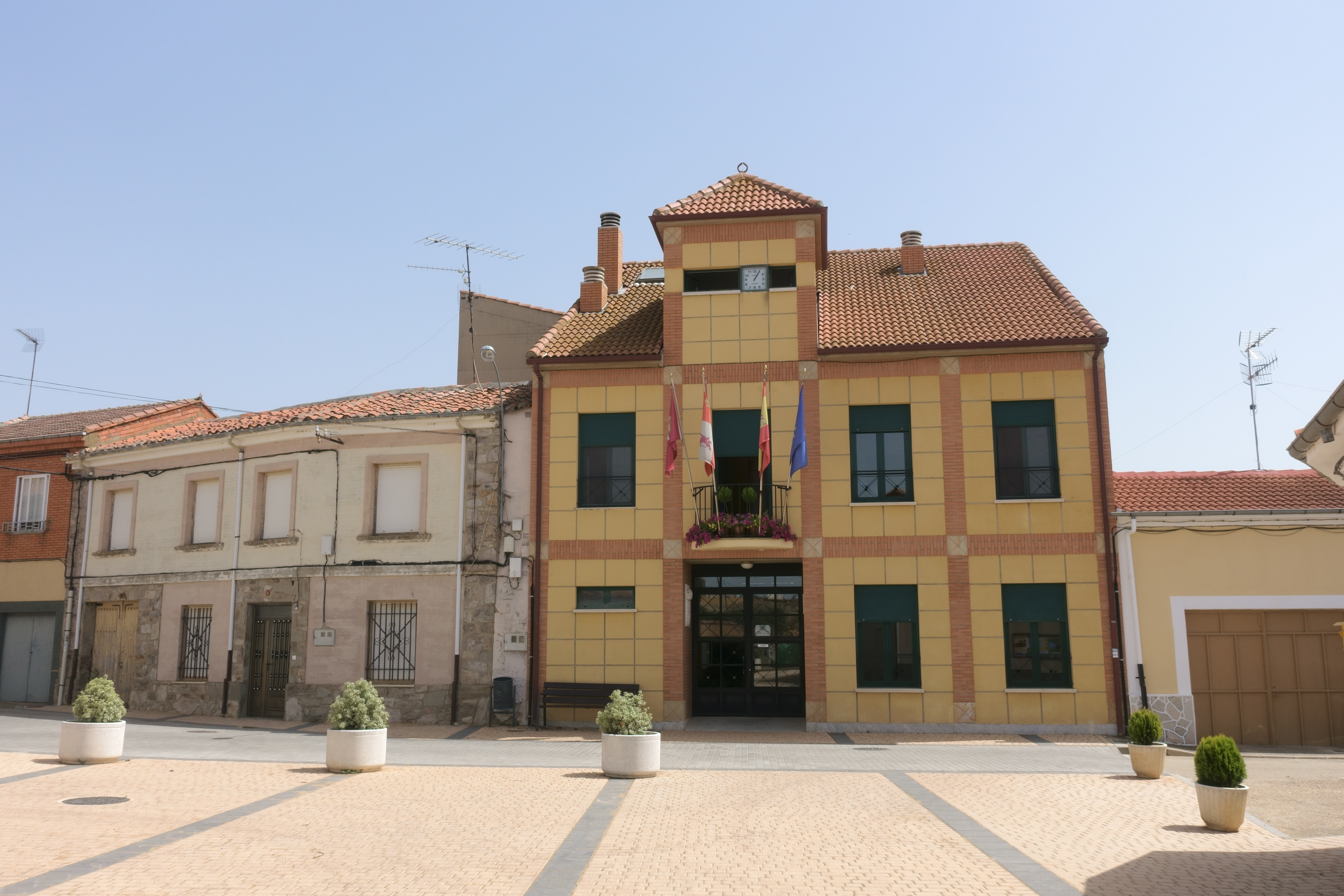 Casa consistorial de Santa Elena de Jamuz (León, España).